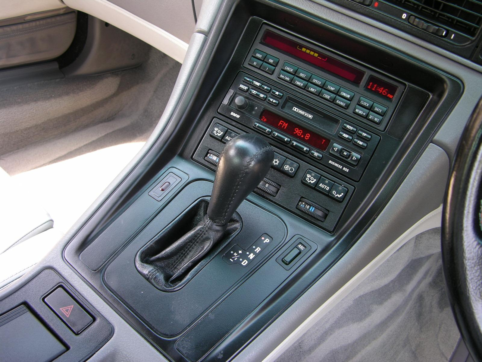 BMW E31 840Ci Sport center console.